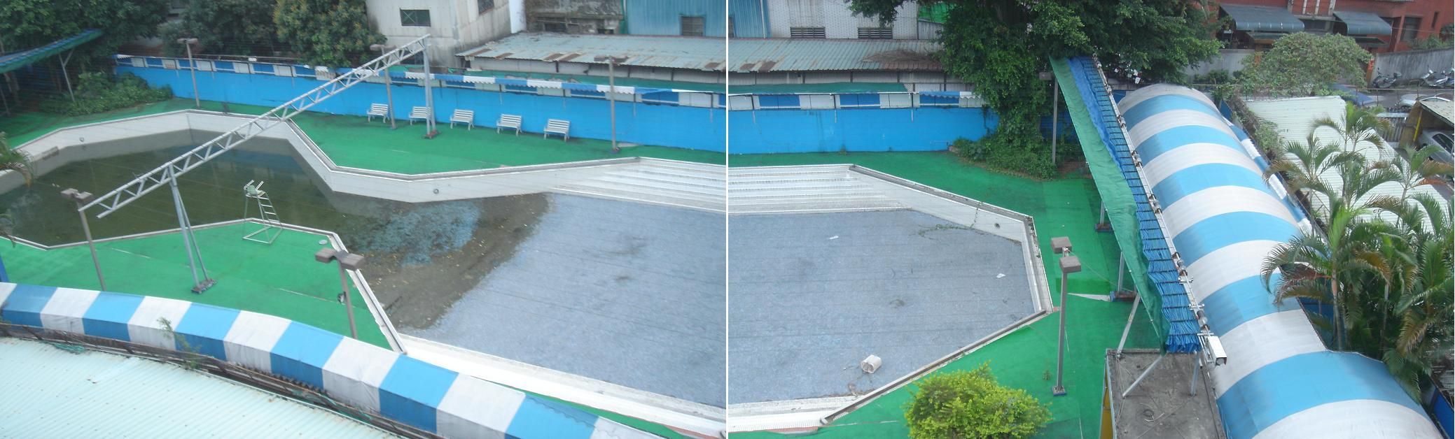 台北縣中和市自強游泳池葫蘆池。